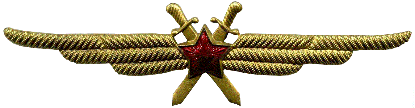 Нагрудный знак "Военный лётчик без класса" образца 1949 года